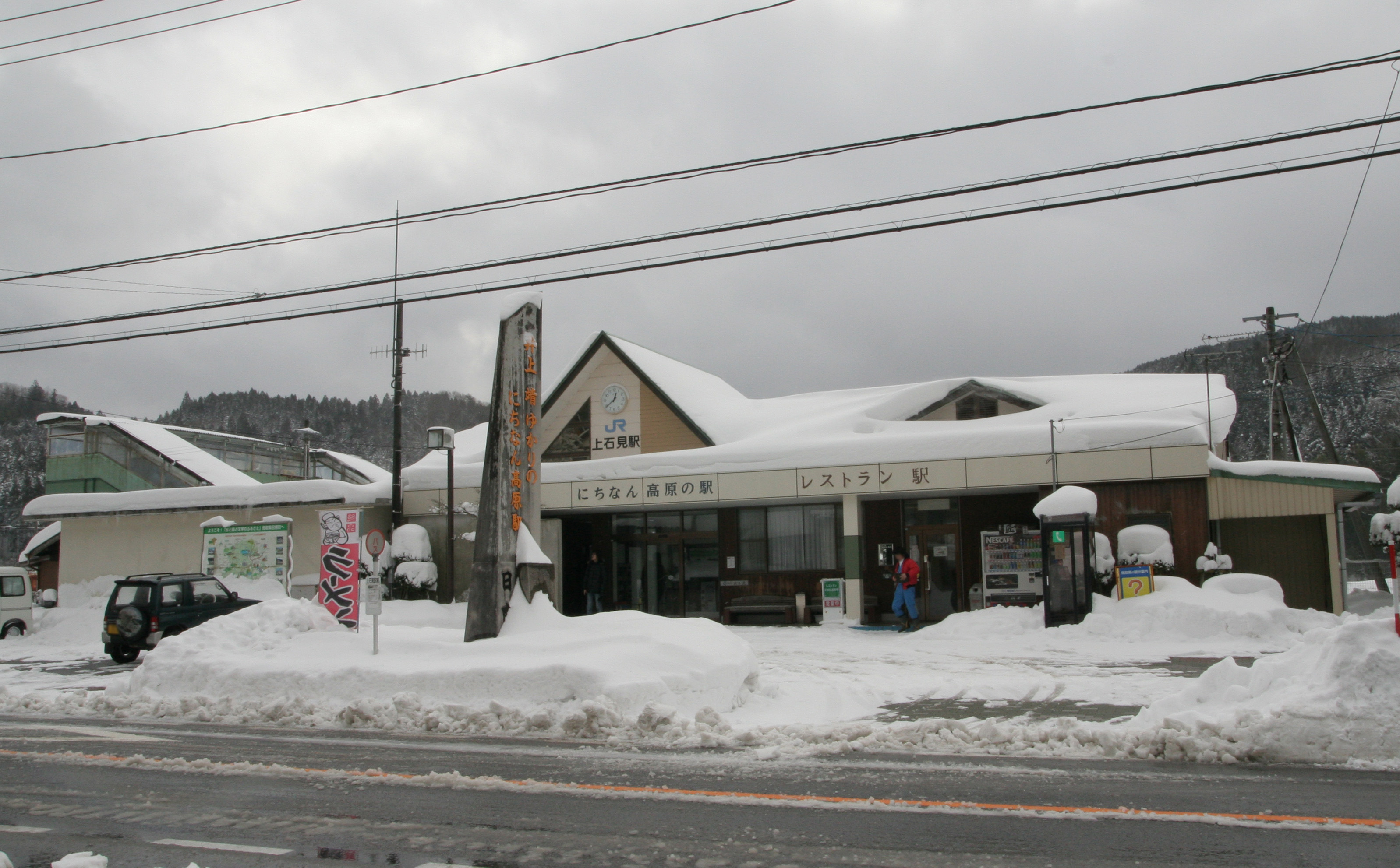 上石見駅の駅舎